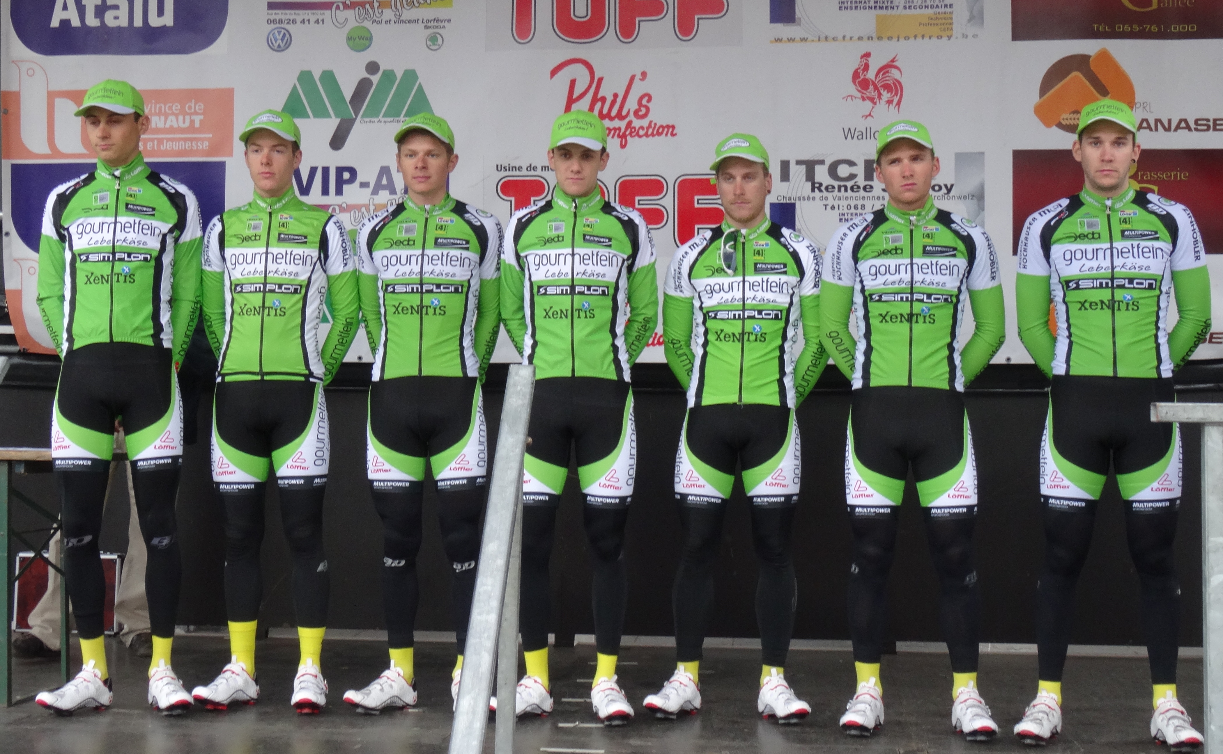 Triptyque des Monts et Châteaux 2014, étape 1, 4 avril 2014, départ d'Antoing. Depicted people: Lukas Zeller, Johannes Windischbauer, Sebastian Schönberger, Patrick Konrad, Paul Illenberger, Daniel Biedermann and Mario Schoibl Depicted team: Gourmetfein Simplon Wels The creation of these files was made possible thanks to the organizers of the Triptyque des Monts et Châteaux 2014 English | français | +/−